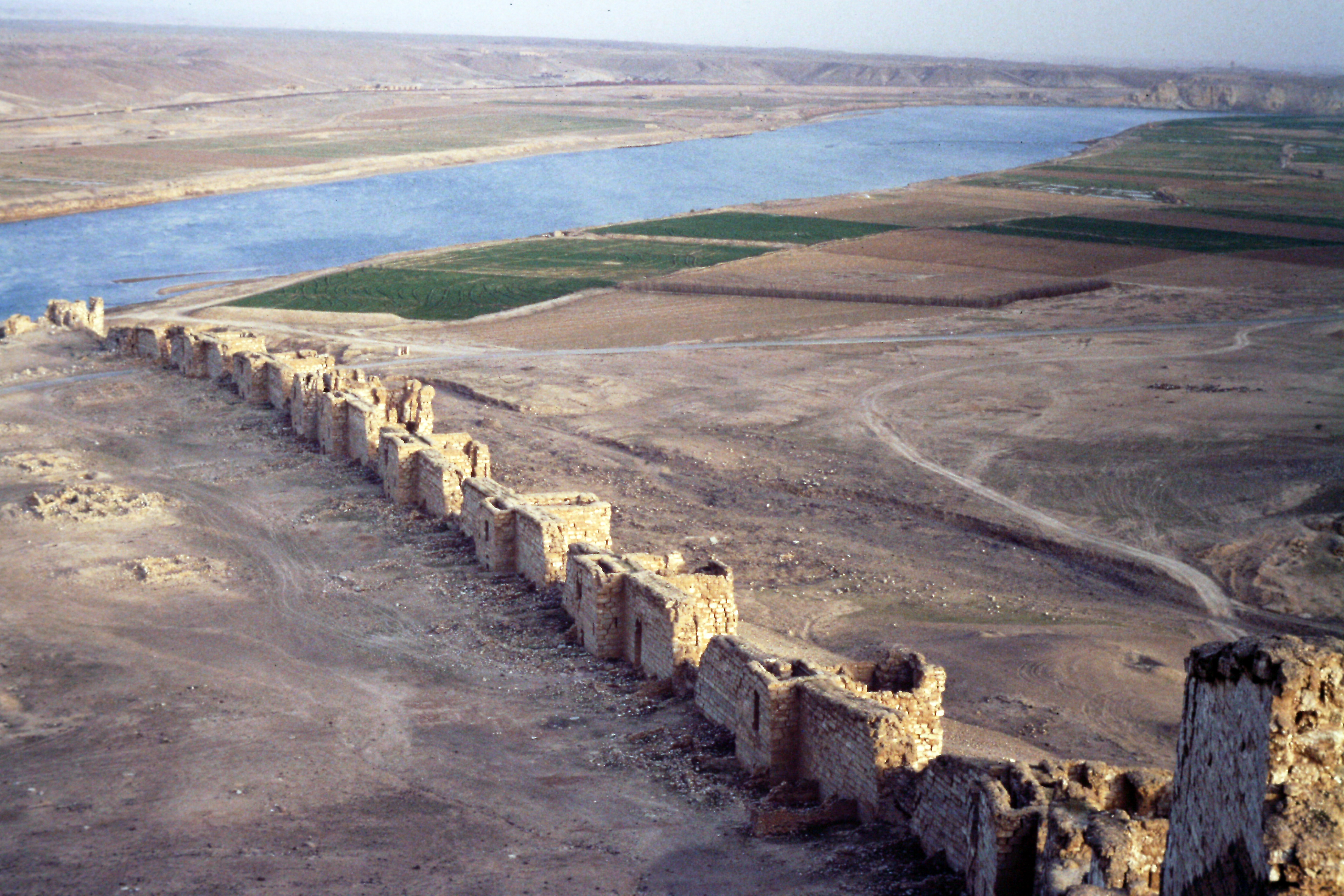 Zenobia, 1993